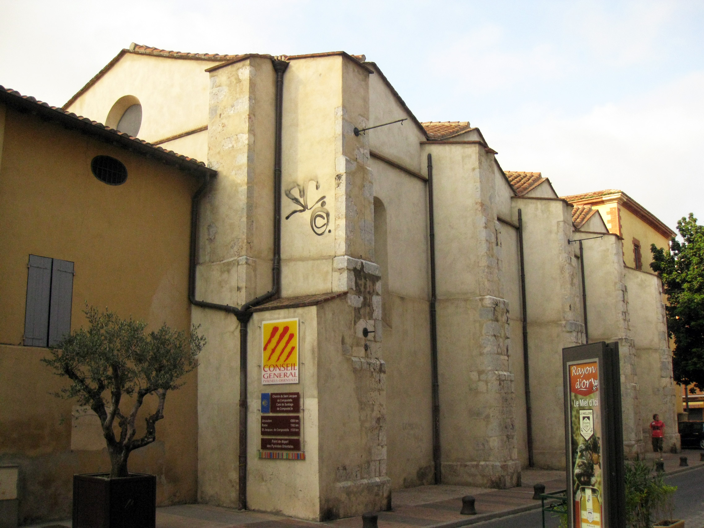 Capella de Nostra Senyora dels Àngels (Perpinyà) .